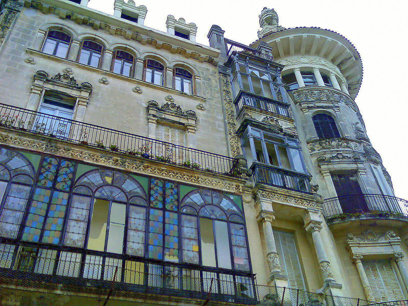 Torre dos Moreno de Ribadeo, Galiza